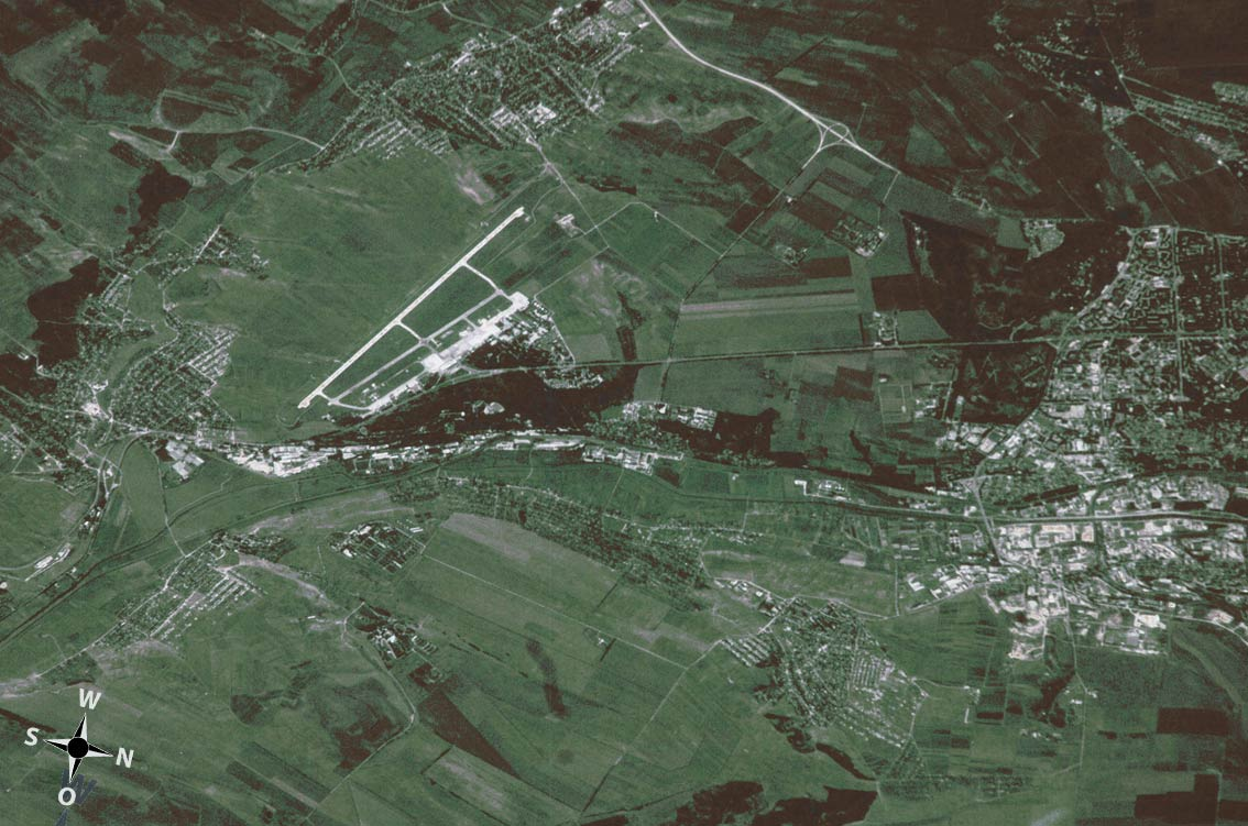 Satelliten-Aufnahme Chișinău, Moldawien - Aeroportul Internaţional Chișinău nachträglich bearbeitet durch Perconte